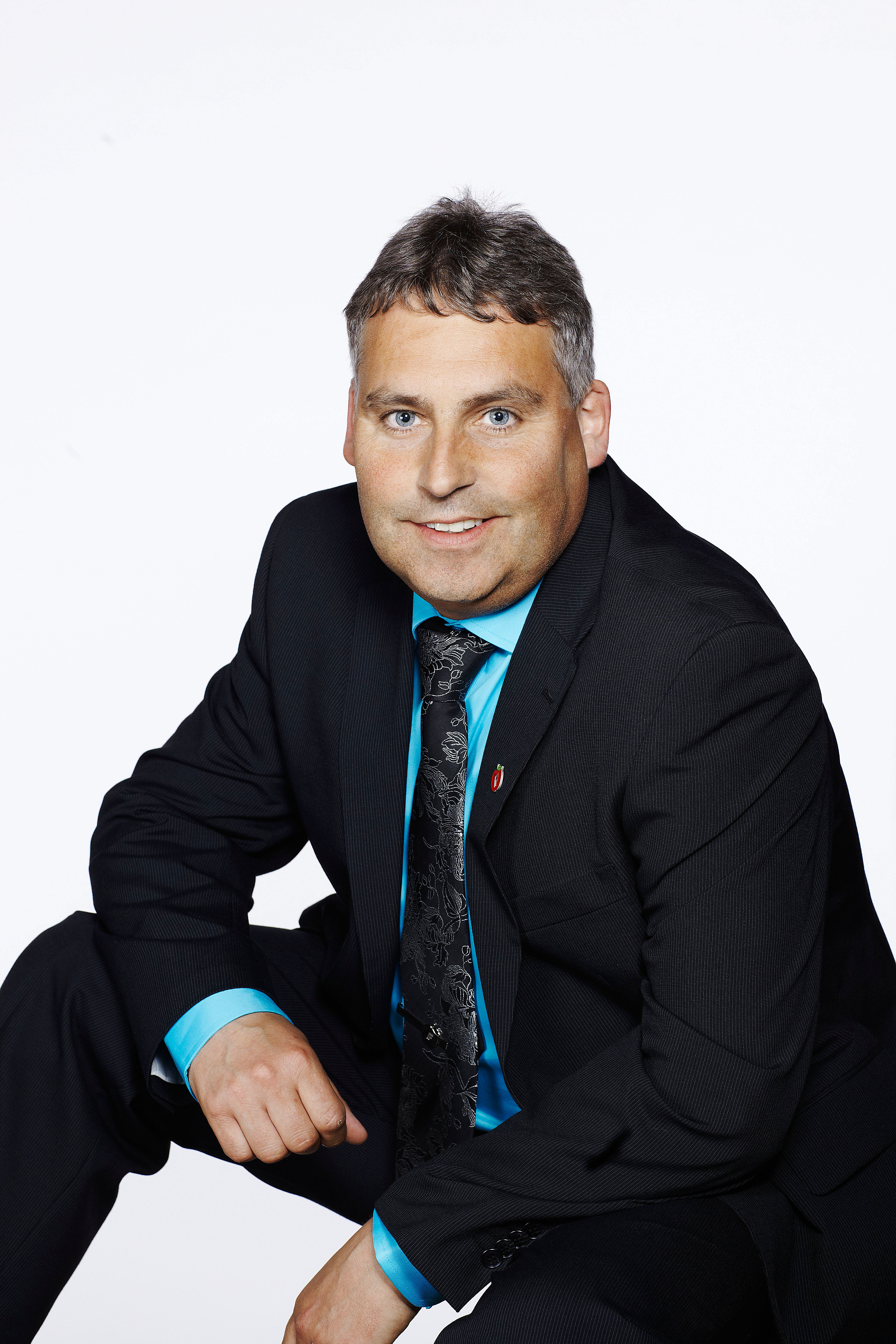 Torgeir Trældal